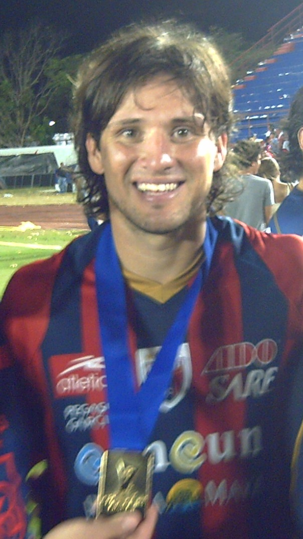 2009 Gaby Pereyra - Campeón de CONCACAF con Atlante FC